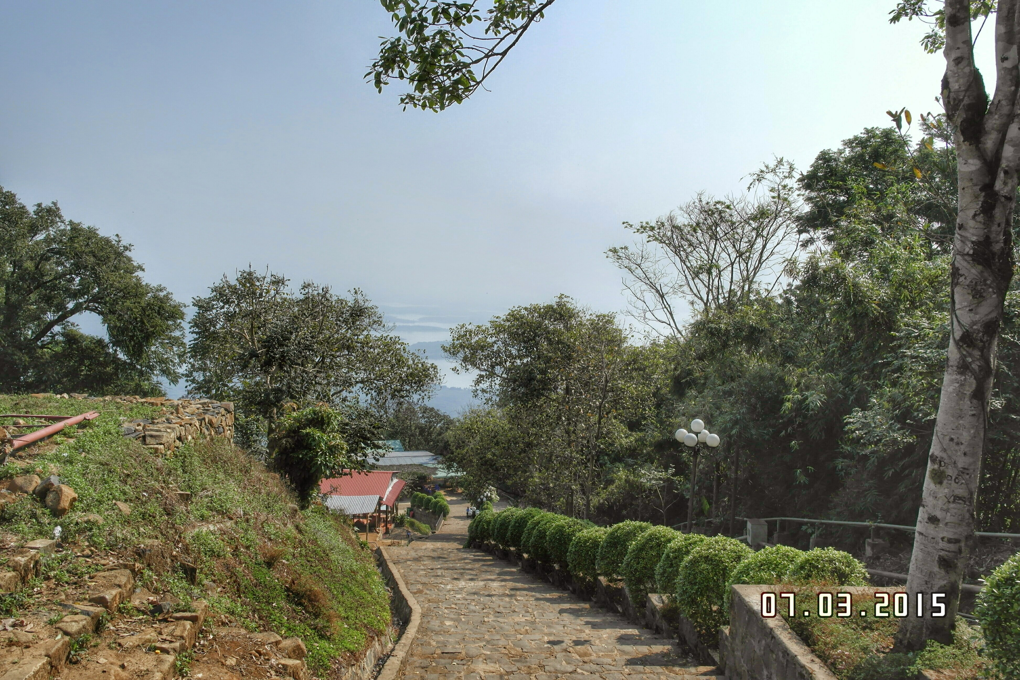 Đỉnh núi Bà Rá